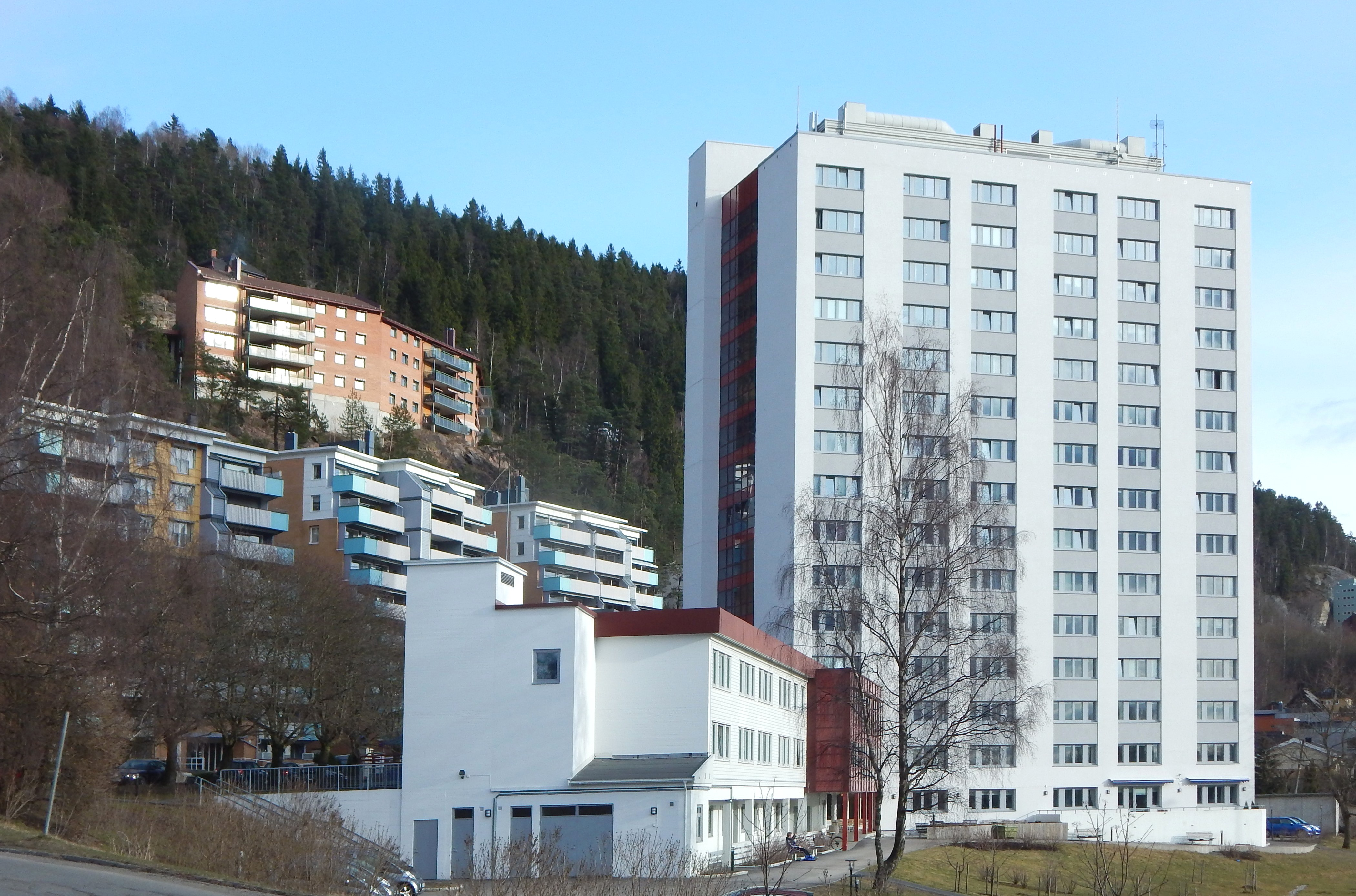 Hareveien 10